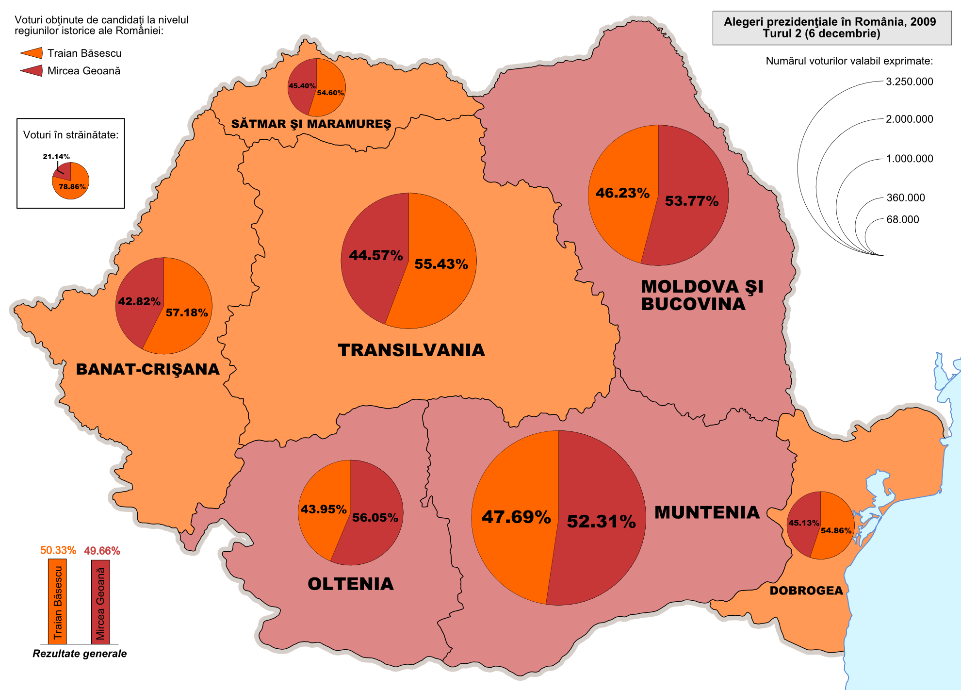 Rezultatele alegerilor prezidentiale din 2009 (turul II) la nivelul aproximativ al regiunilor istorice ale Romaniei.